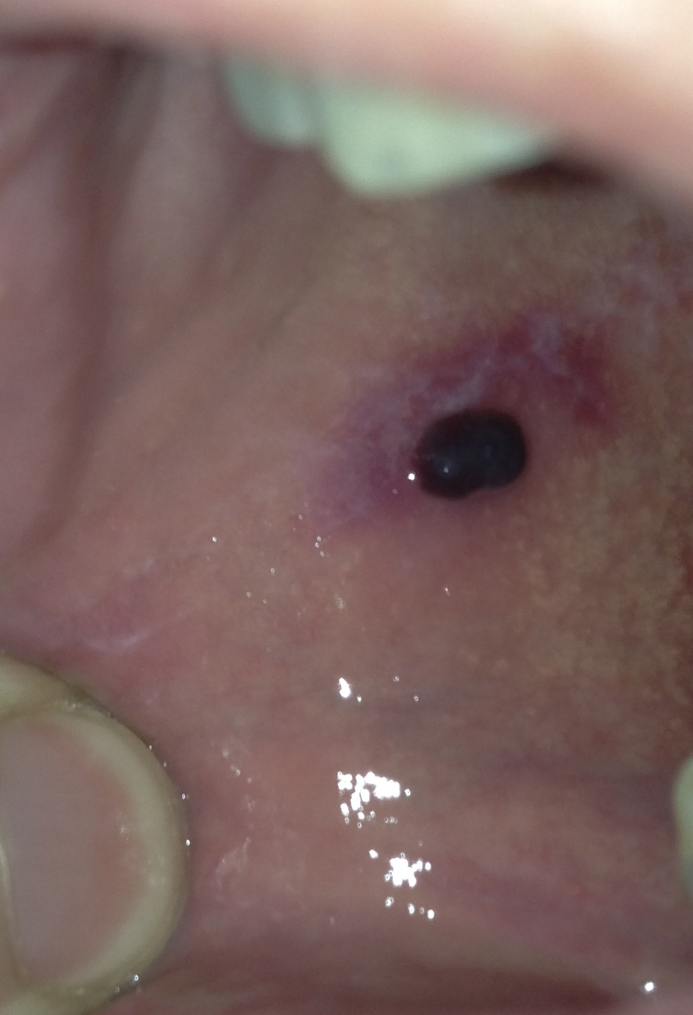 Bullosa haemorrhagica oralis (BHO)